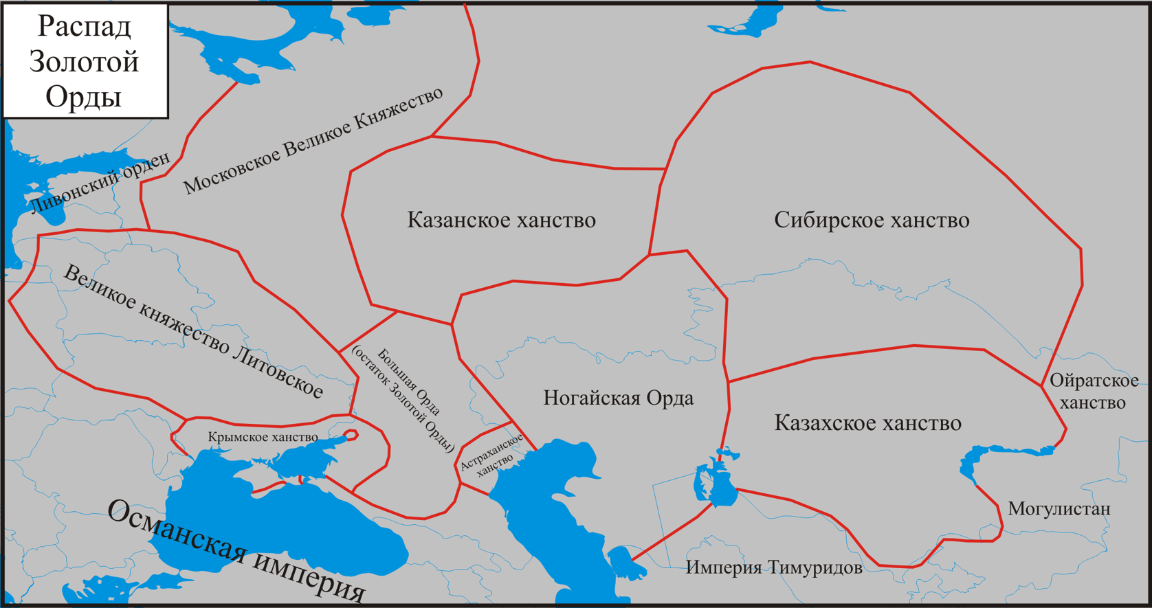 Карта распада Золотой Орды